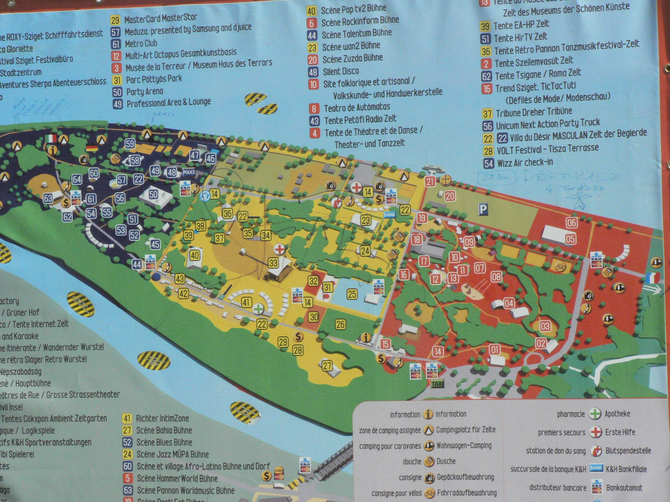 A felvétel 2006. augusztus 15-én készült. Budapest, Sziget Fesztivál. ©© Derzsi Elekes Andor, Budapest, 2014, A kép egészben, vagy részletekben másolását, bármilyen úton történő sokszorosítását és felhasználását a szerző ellenérték nélkül, jogutódjaira is kihatóan megengedi. Az engedély kiterjed a kereskedelmi célú hasznosításra is. Kéri azonban nevének feltüntetését a felhasználás során. A Metapolisz sorozat valamennyi képe és filmje Creative Commons alatti valamint kereskedelmi - for profit - célra is felhasználható. Ajánlott hivatkozás: Derzsi Elekes Andor: Metapolisz DVD line